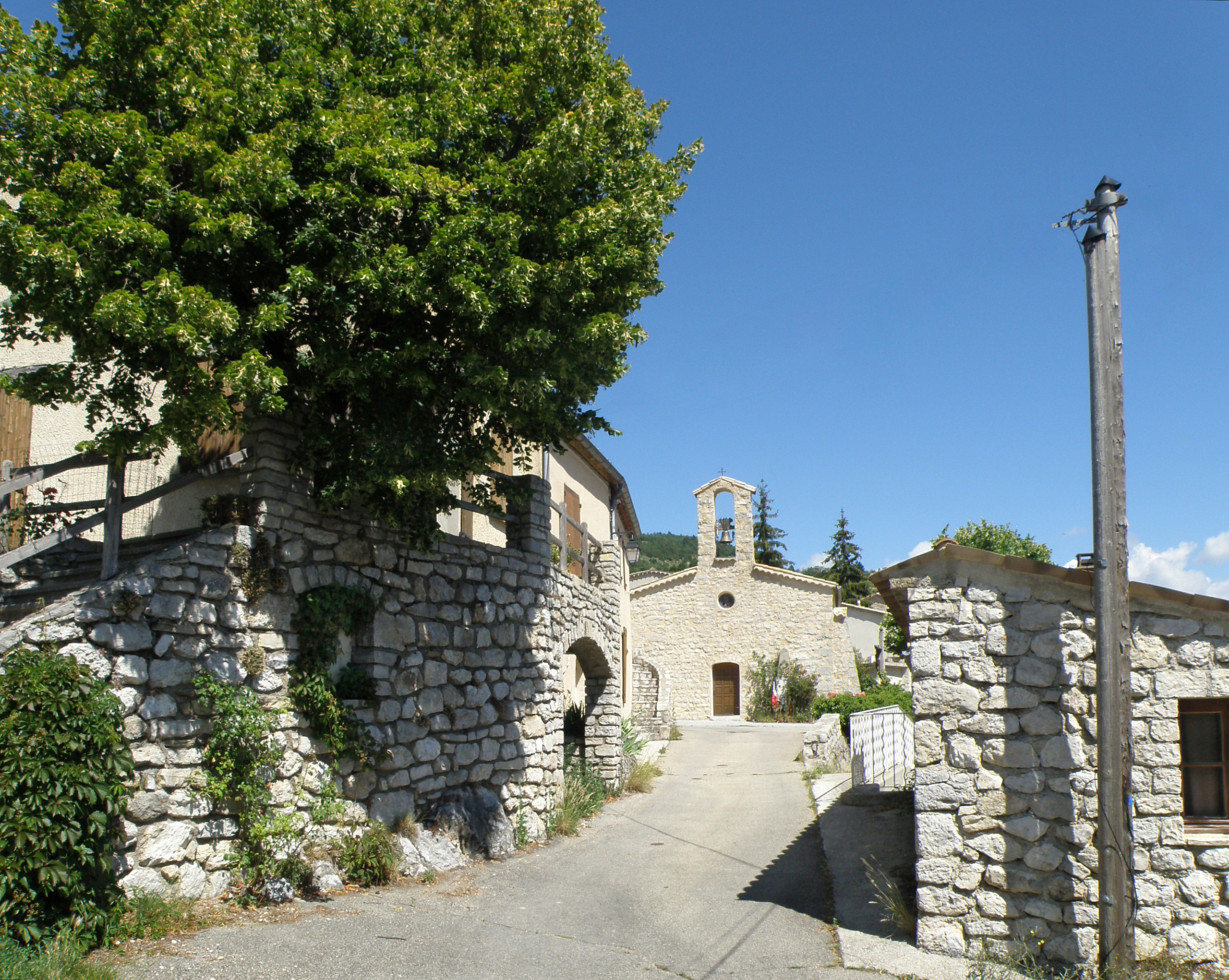 Le Poët-en-Percip (Drôme, France). Aspect du vieux bourg, avec l'église Saint-Simon.